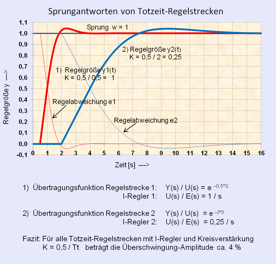 Sprungantwort eines Regelkreises mit verschiedenen Totzeit-Regelstrecken